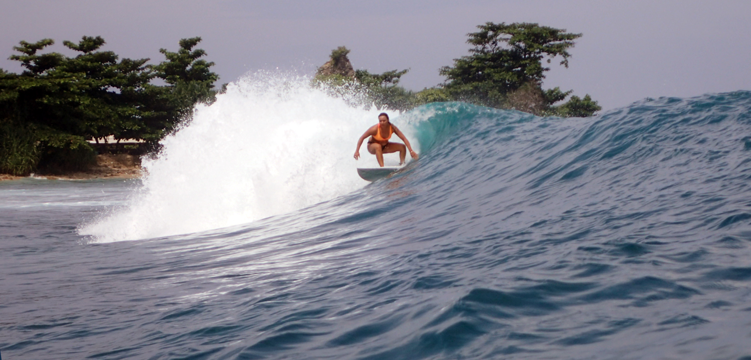 Surfing di Pantai Ciantir, Sawarna, Bayah, Lebak, Banten.